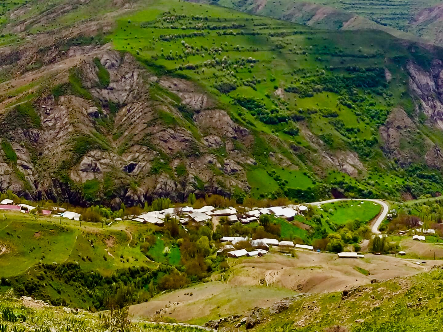 Culfa dağları Boyəhməd meşə